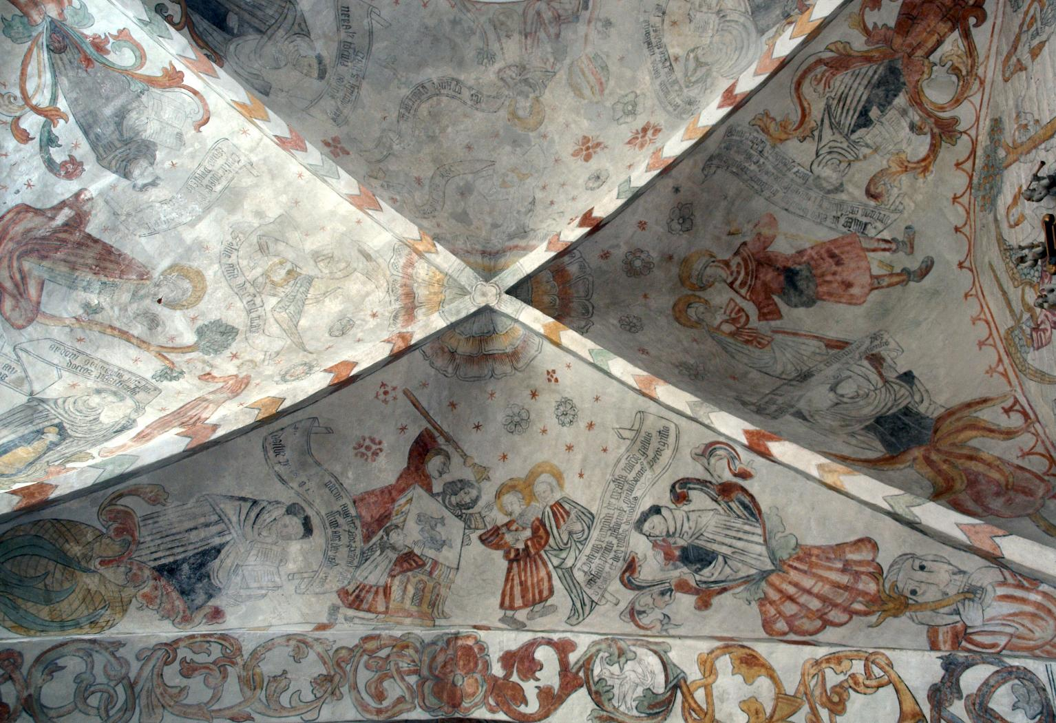 Saeby (Frederikshavn Kommune), Klosterkirche, Decke, Foto 2014